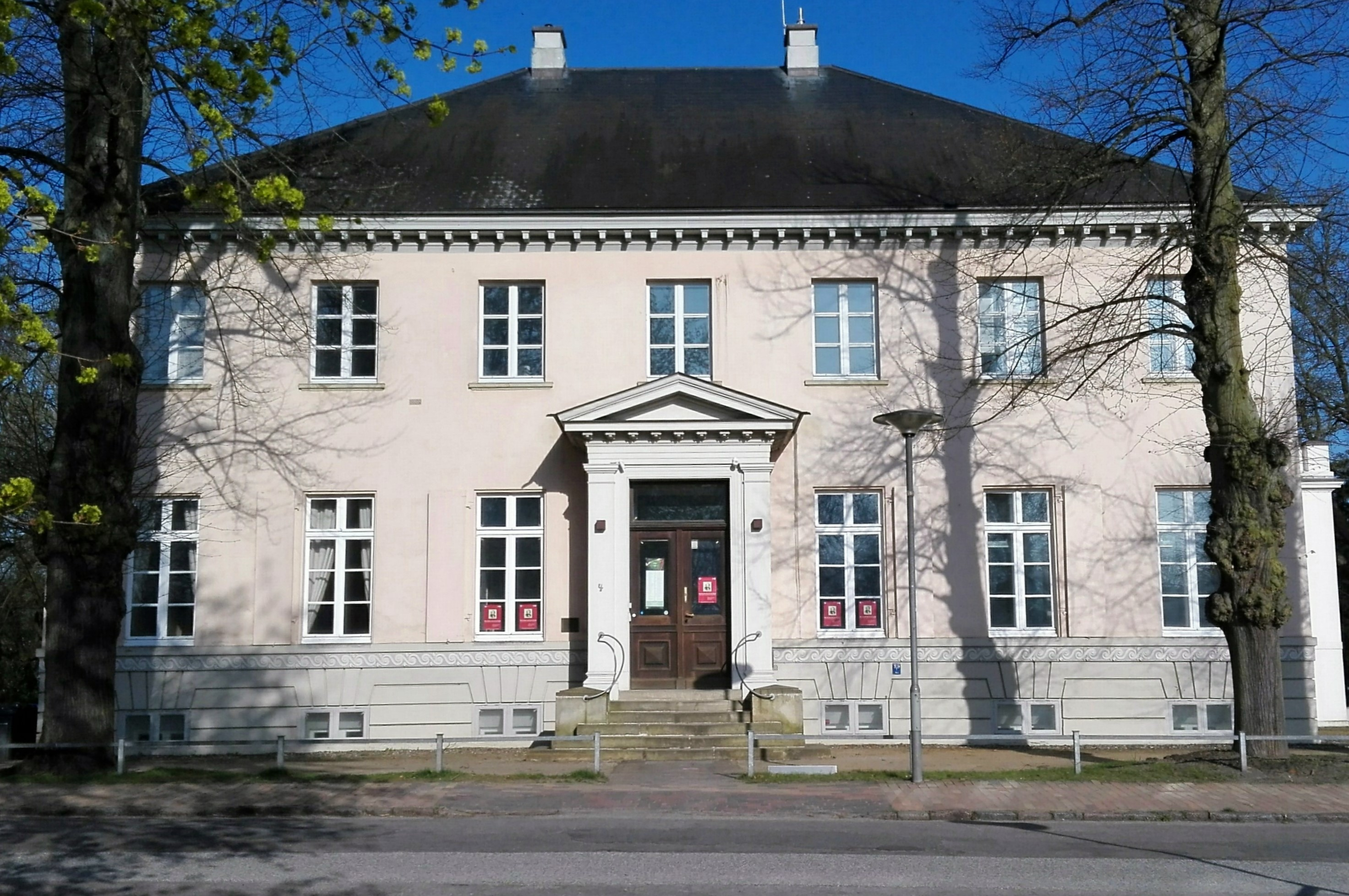 Villa von Henry Koch, Eschenburg und heute Sitz des Brahmsinstituts